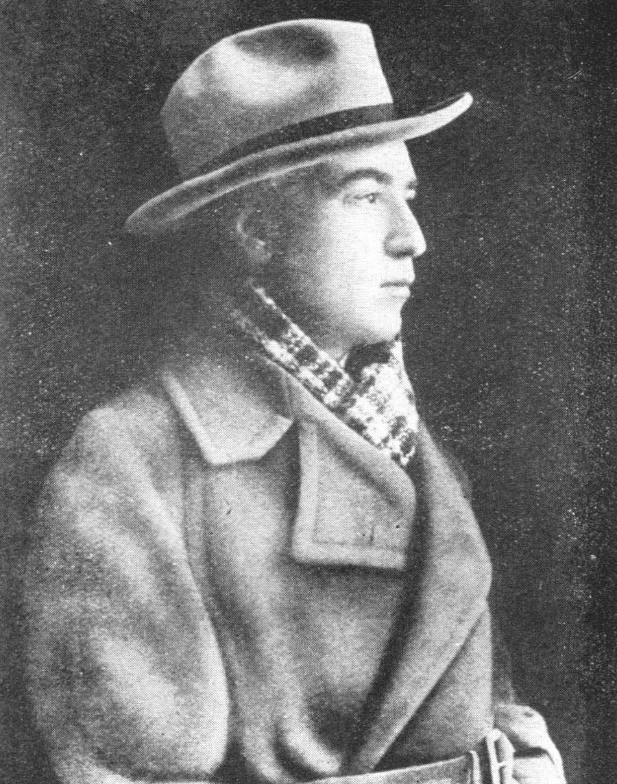 Il regista francese Abel Gance nel 1924